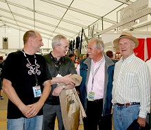 Helmut Horn, Martin Winterkorn, Adolf Stark und Ferdinand Piëch (von links nach rechts)